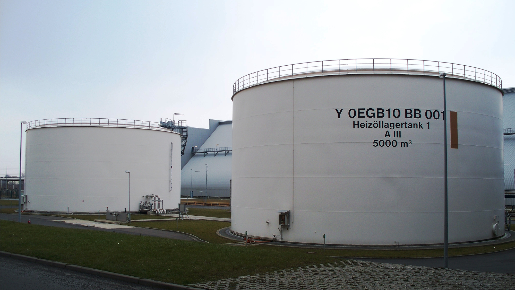 Heizöllagertanks des Braunkohlekraftwerks Lippendorf. Das Heizöl wird zeitweise zum Anfeuern benötigt.